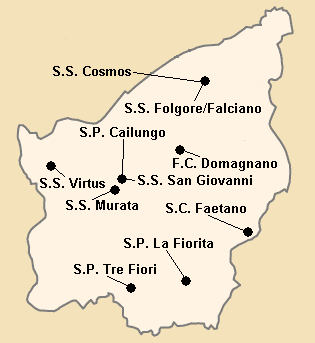 Répartition géographique des clubs lors de la saison 1995-96.